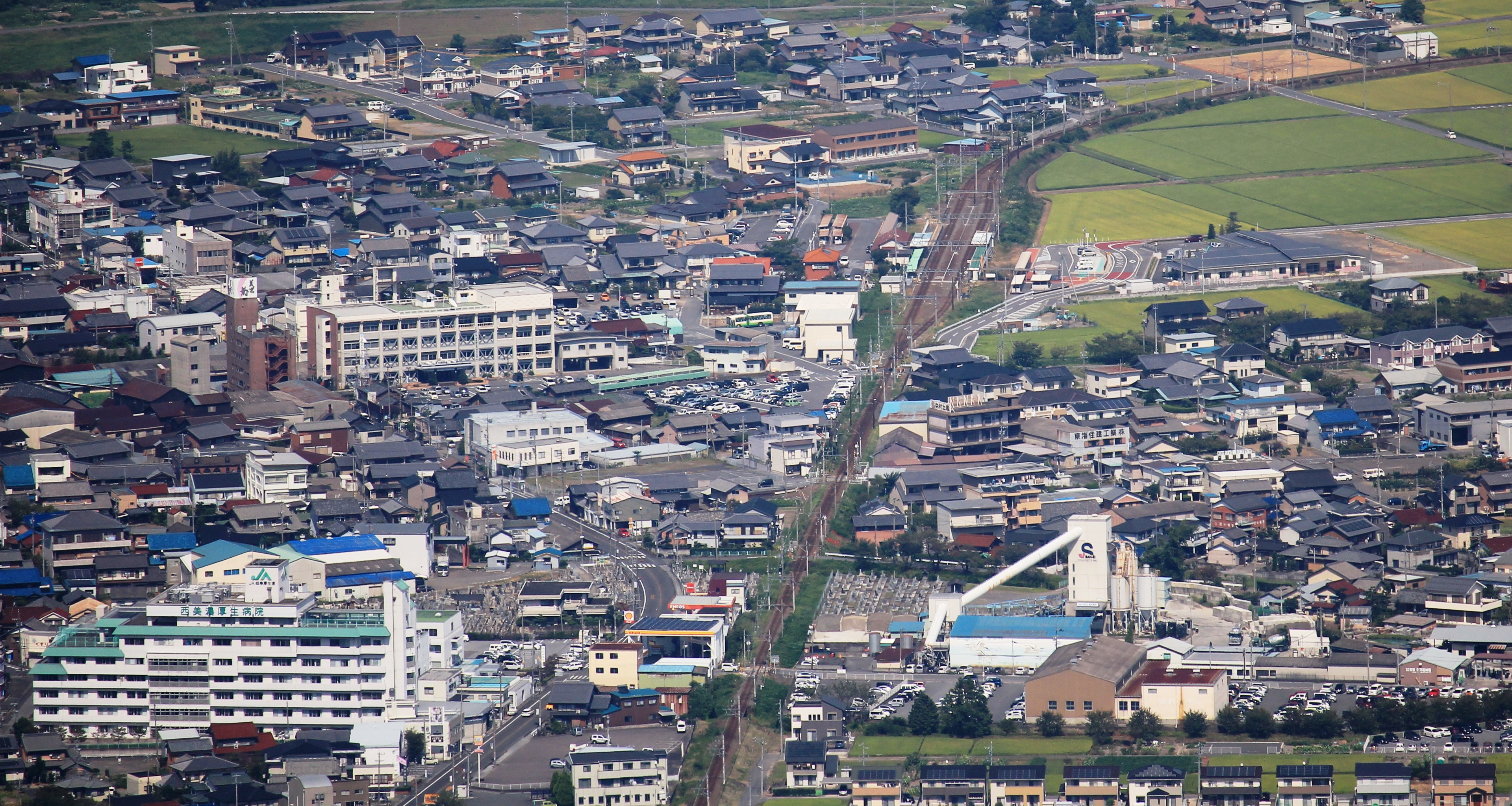 養老山から望む養老鉄道養老線の美濃高田駅と養老町役場（岐阜県養老町）